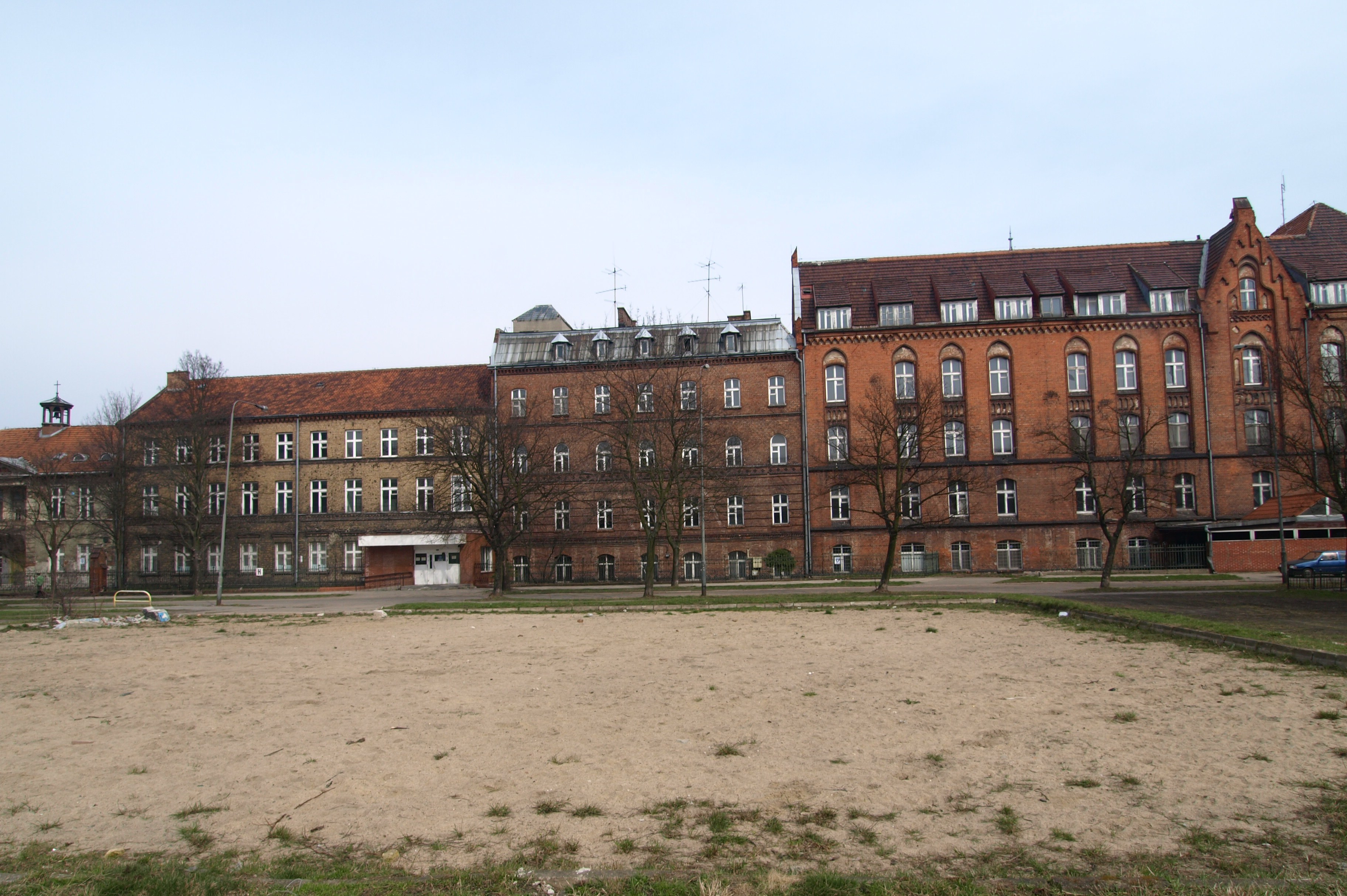 Gdańsk Dolne Miasto. Budynki byłego Państwowego Szpitala Klinicznego nr 3 (zwanego też szpitalem przy Łąkowej czy prof. Kieturakisa).